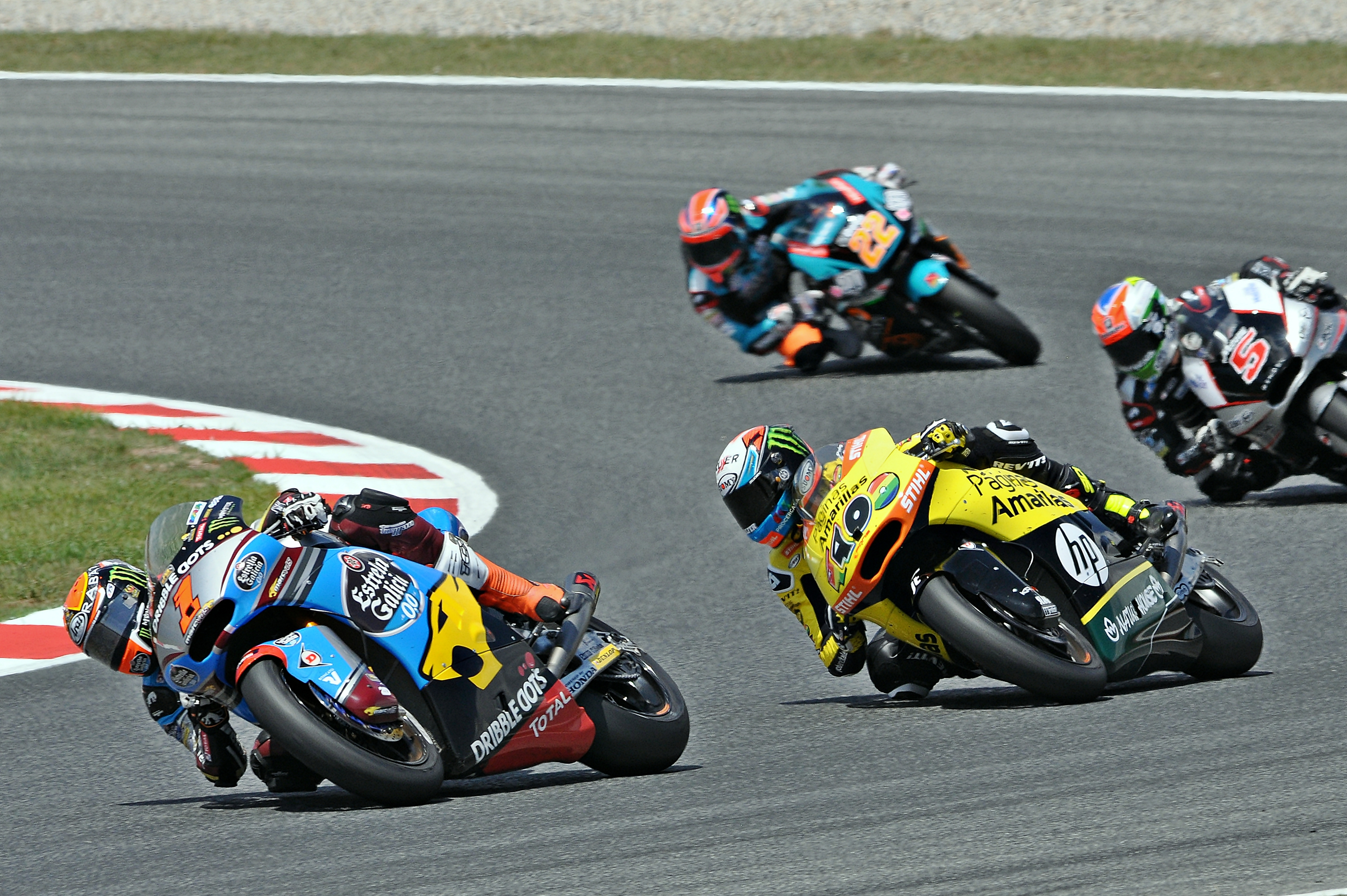 gran premio de cataluña